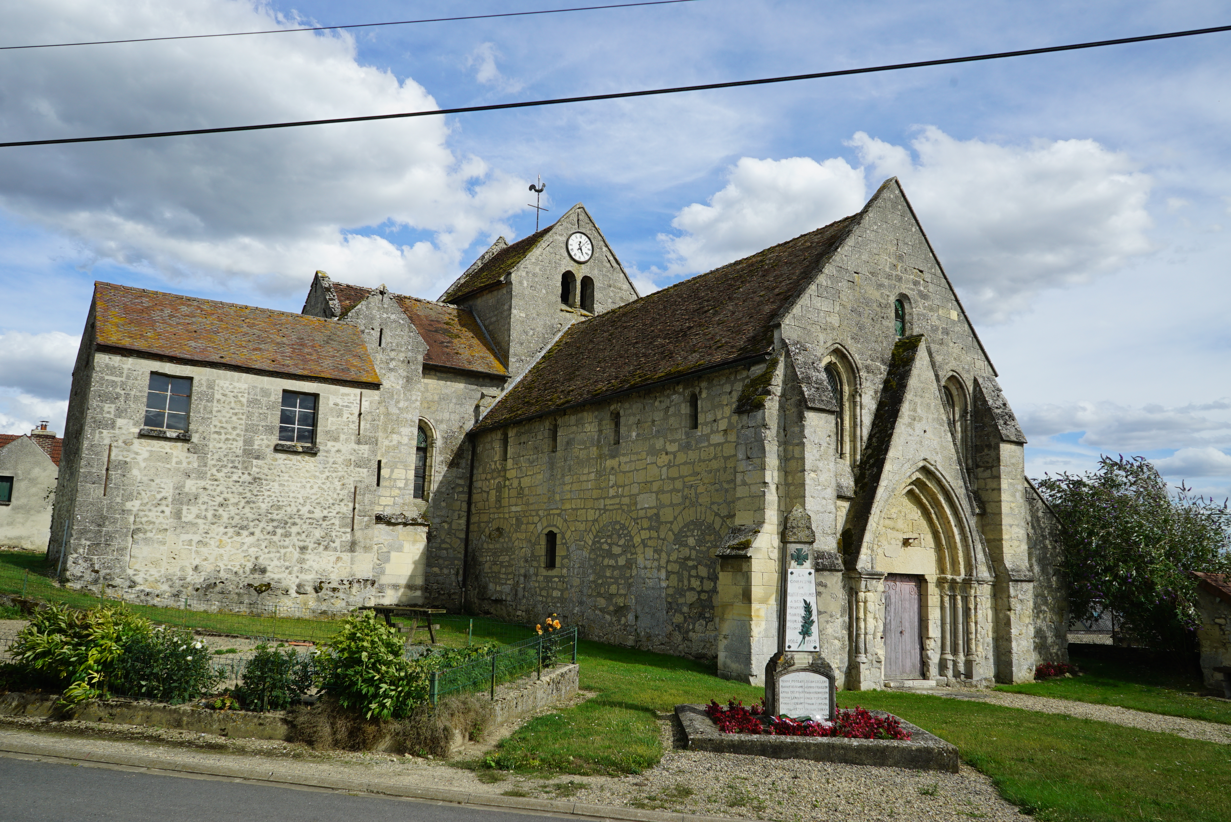 vue de Blanzy.